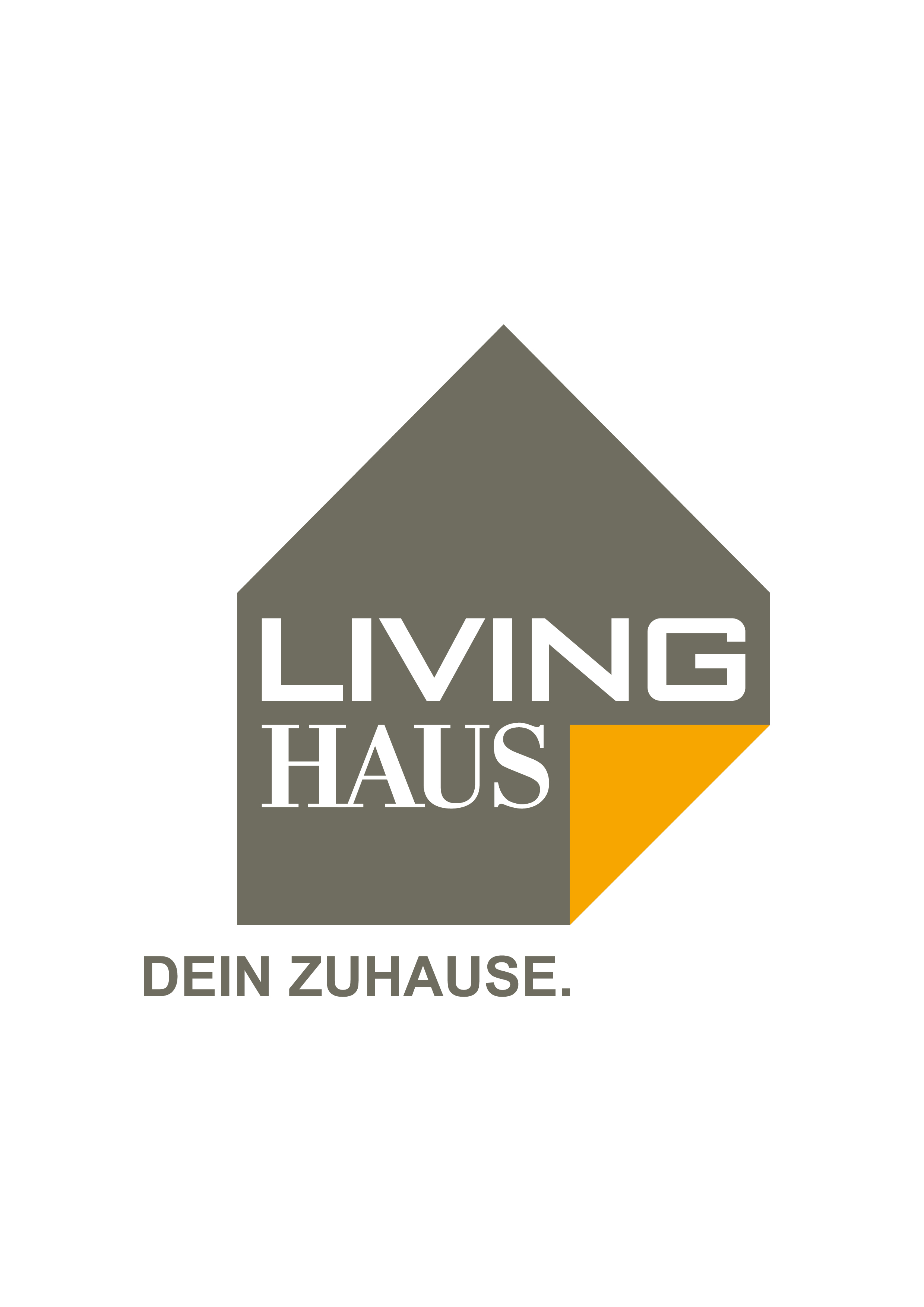 Logo Living Haus vgl.